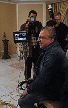 حسین سهیلی‌زاده - پشت صحنه مجموعه تلویزیونی آوای باران - دی ۱۳۹۲